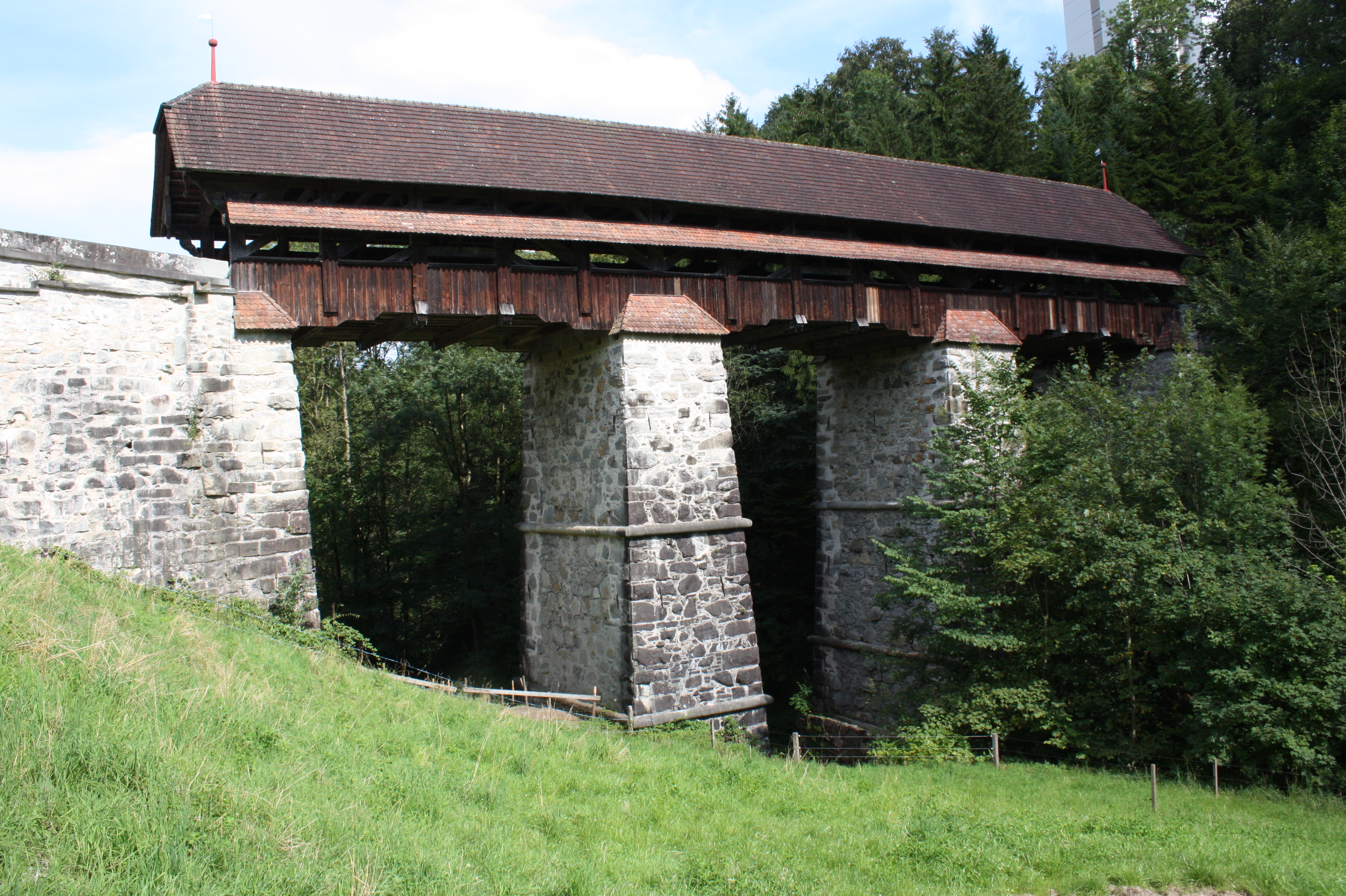 Rothenburg LU, alte Holzbrücke (Westansicht)